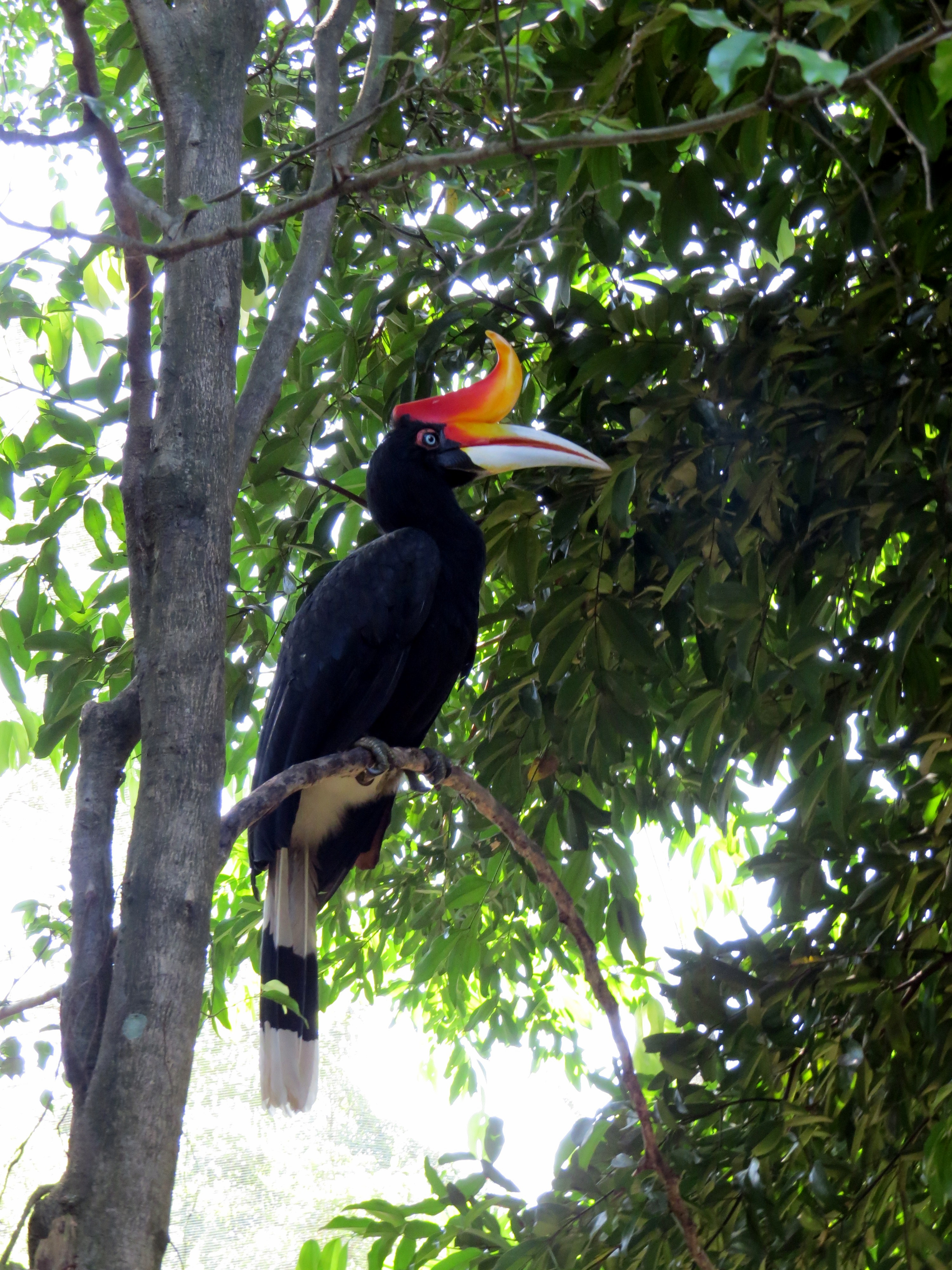 Travel in Kuala Lumpur and Putrajaya, Malaysia (cc) David Berkowitz - /